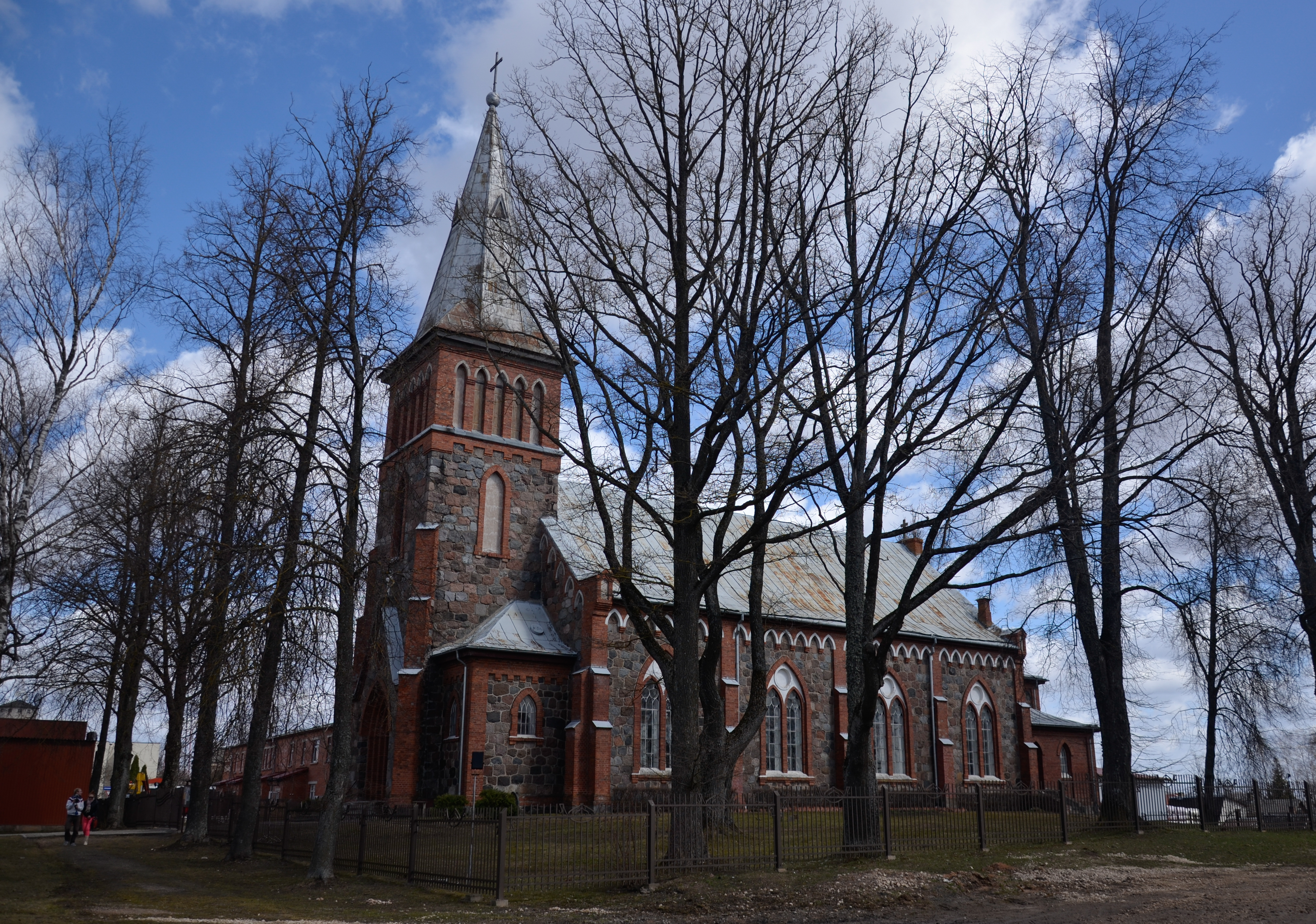 Balvu katoļu baznīca, Balvi, Baznīcas iela 1